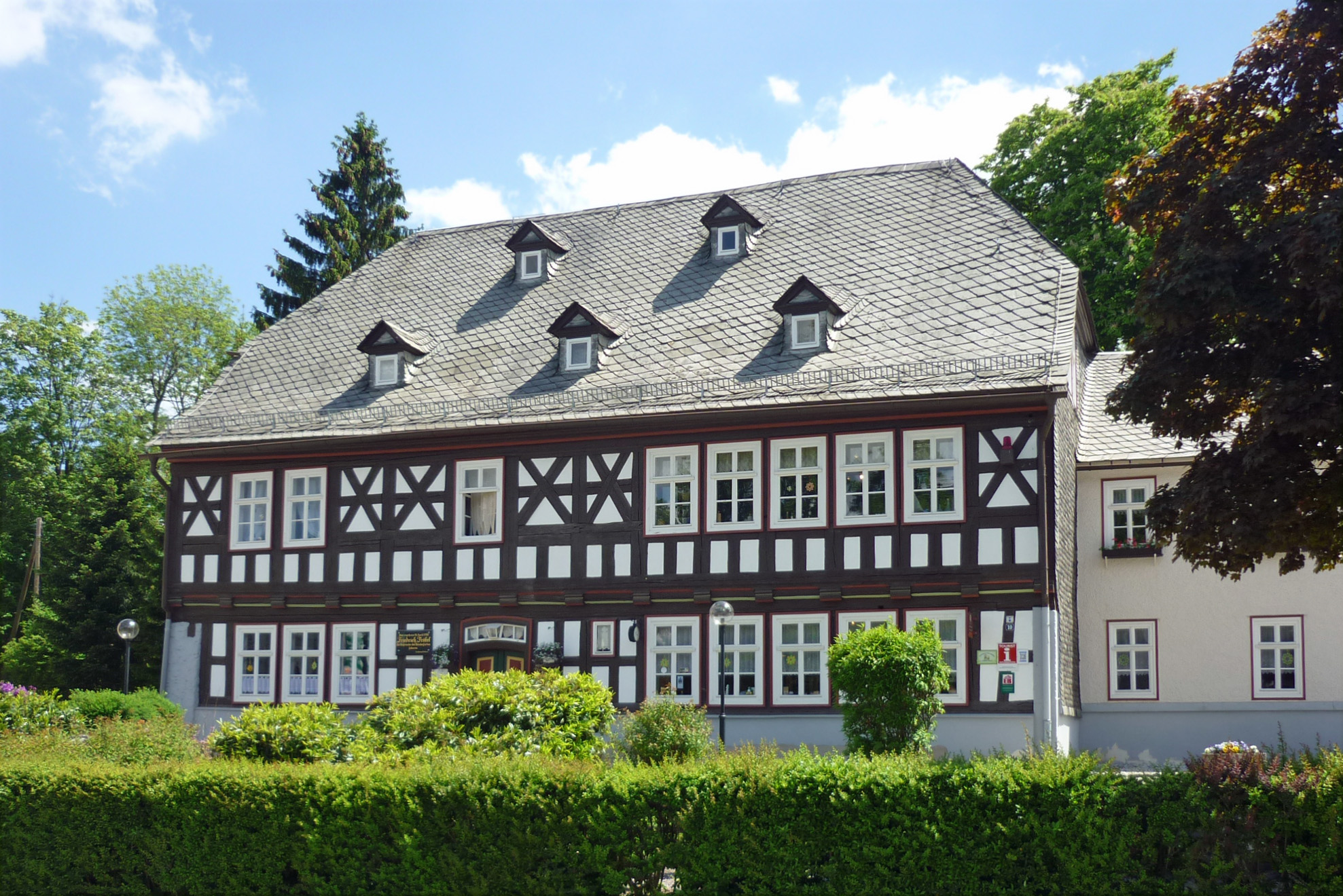 Fröbelhaus in Oberweißbach/Thür. Wald